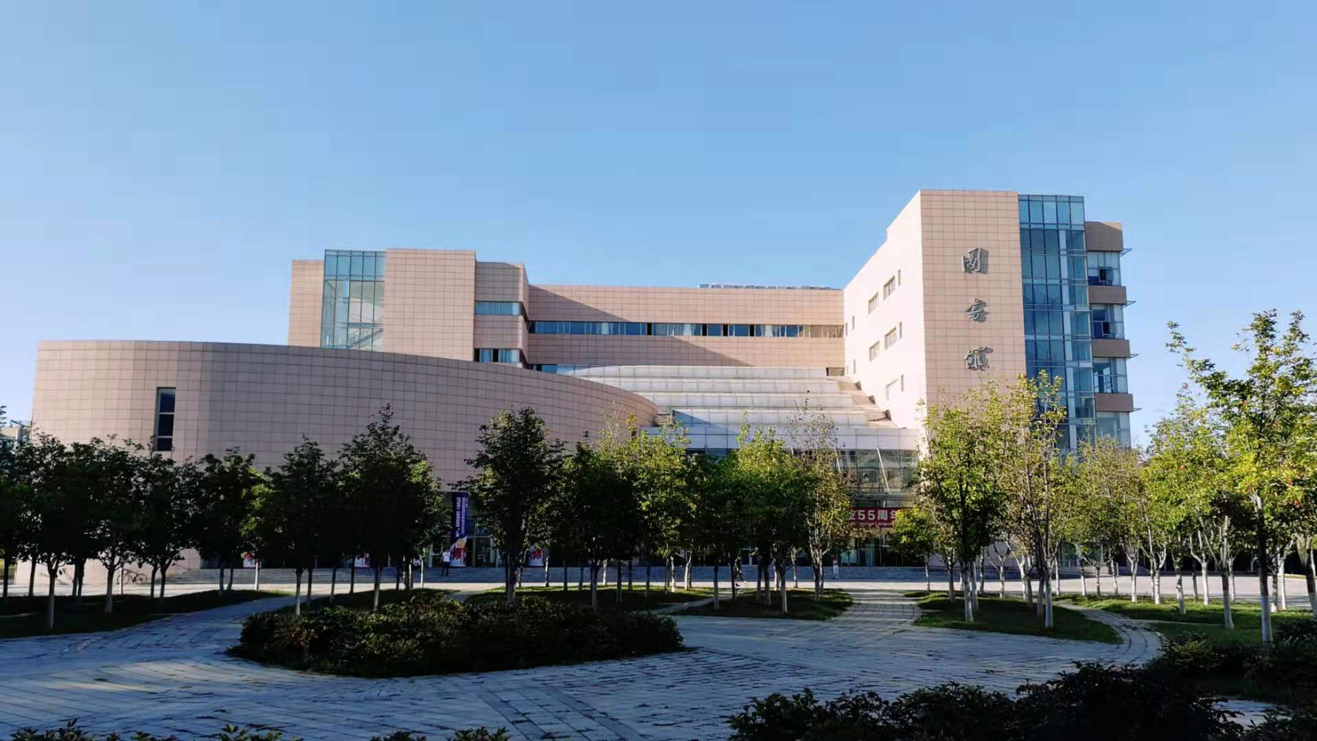 中文（中国大陆）: 图书馆